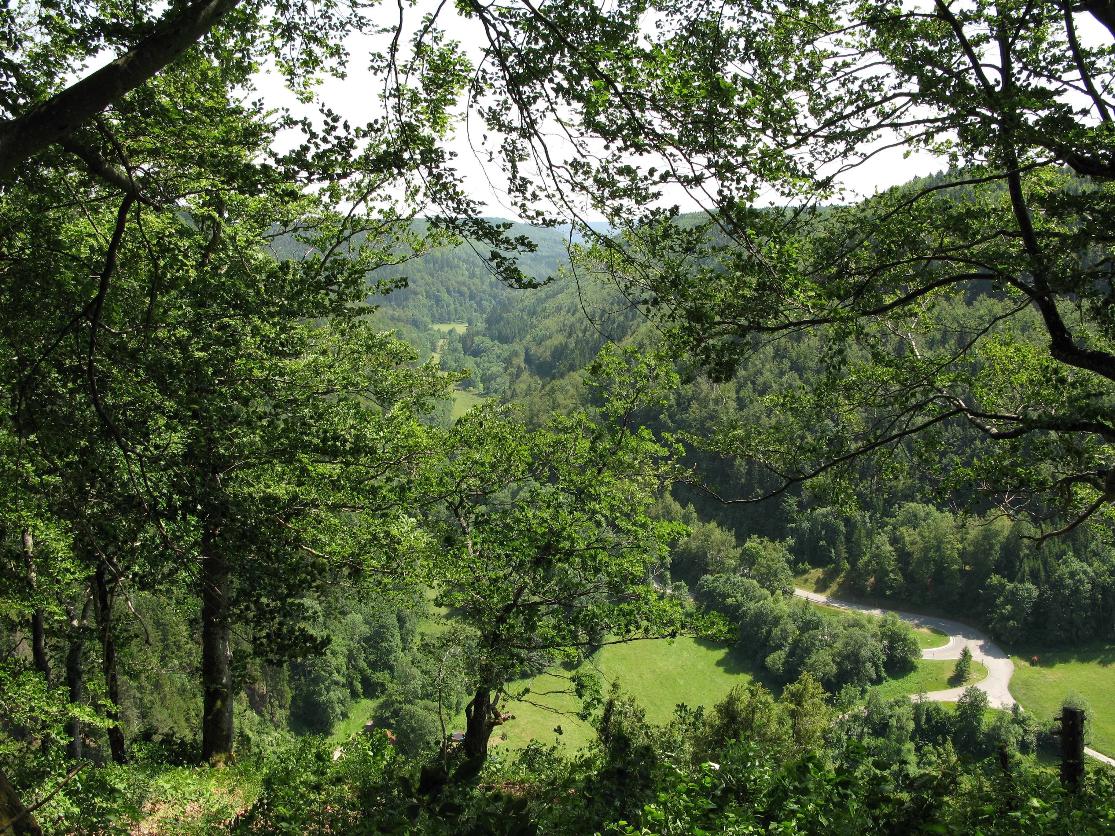 Lippachtal bei Mahlstetten am Donauberglandweg auf der Schwäbischen Alb.